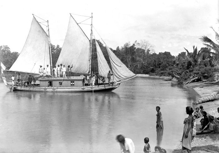 Negatief. Het zeilschip Helena Anna aan de mond van de Riou-Apa in de Orembaai, West-Ceram, Molukken